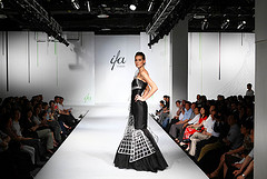 IFA Paris Fashion School